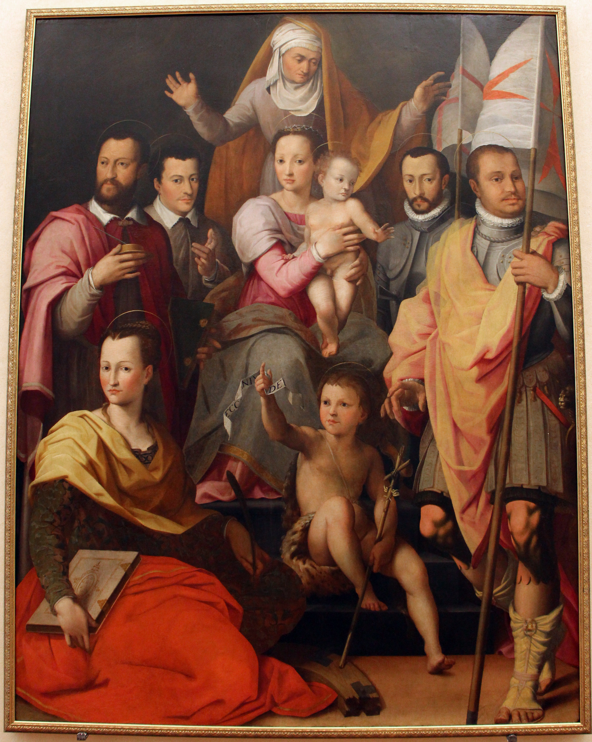 Cenacolo di Andrea Del Sarto - MIBAC The making of this document was supported by Wikimedia CH. (Submit your project!) For all the files concerned, please see the category Supported by Wikimedia CH. This is a photo of a monument which is part of cultural heritage of Italy.